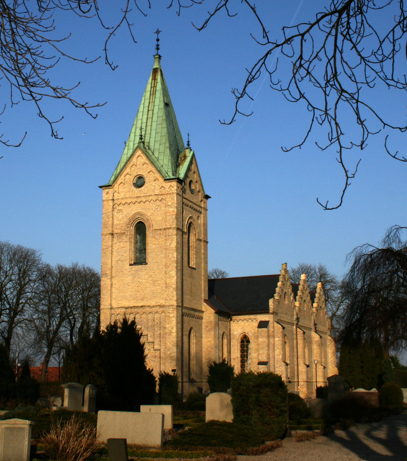 Uppåkra kyrka